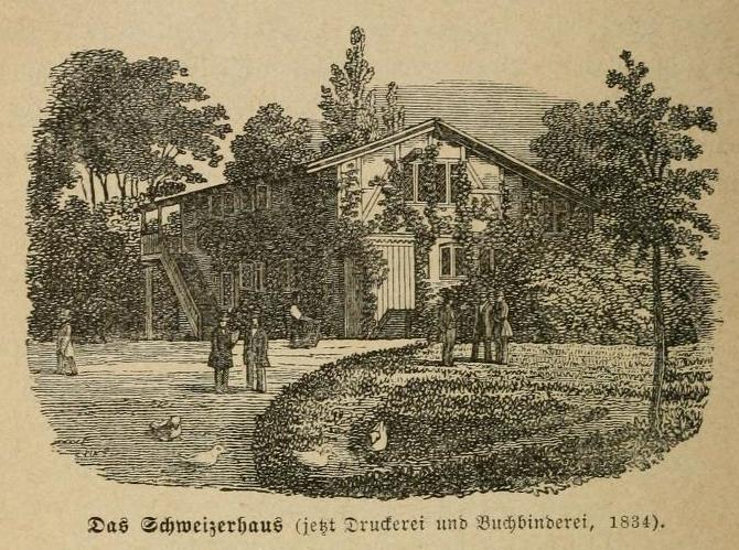 Schweizerhaus, erbaut nach Plänen von Chateauneuf, Wohngebäude, später Druckerei des Rauhen Hauses